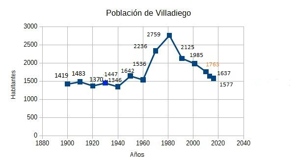 gráfico de villadiego con la población actualizada